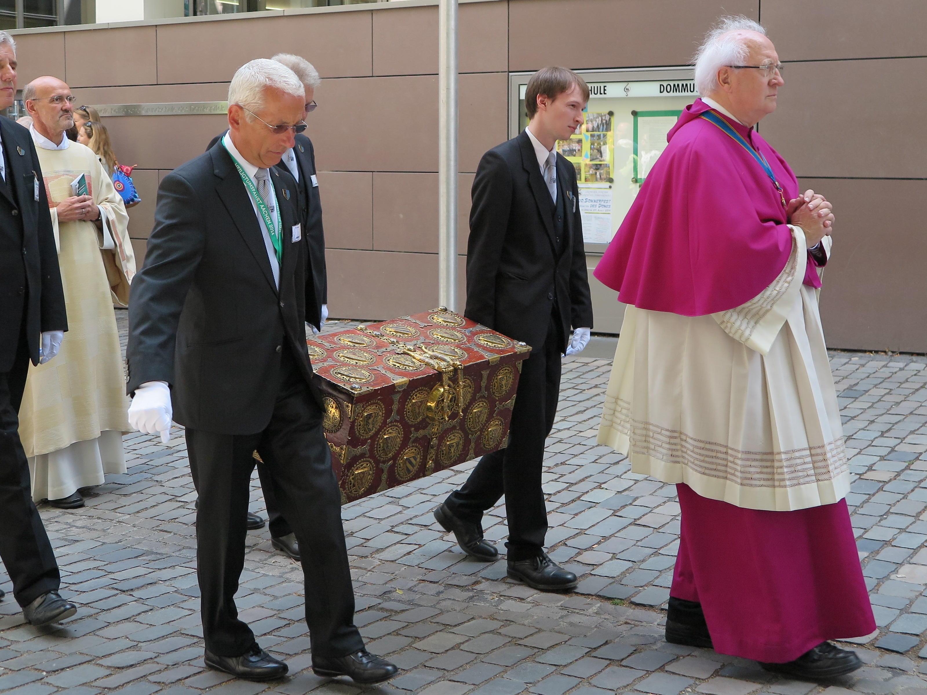 Transport der Heiligtümer der Aachener Heiligtumsfahrt 2014 in der Wappentruhe des Richard von Cornwall von einem Pilgergottesdienst auf dem Katschhof zurück in den Aachener Dom, angeführt von Dompropst Monsignore Helmut Poqué.